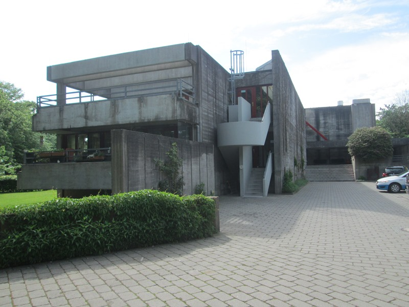 Ungdomskollegiet i Flensborg